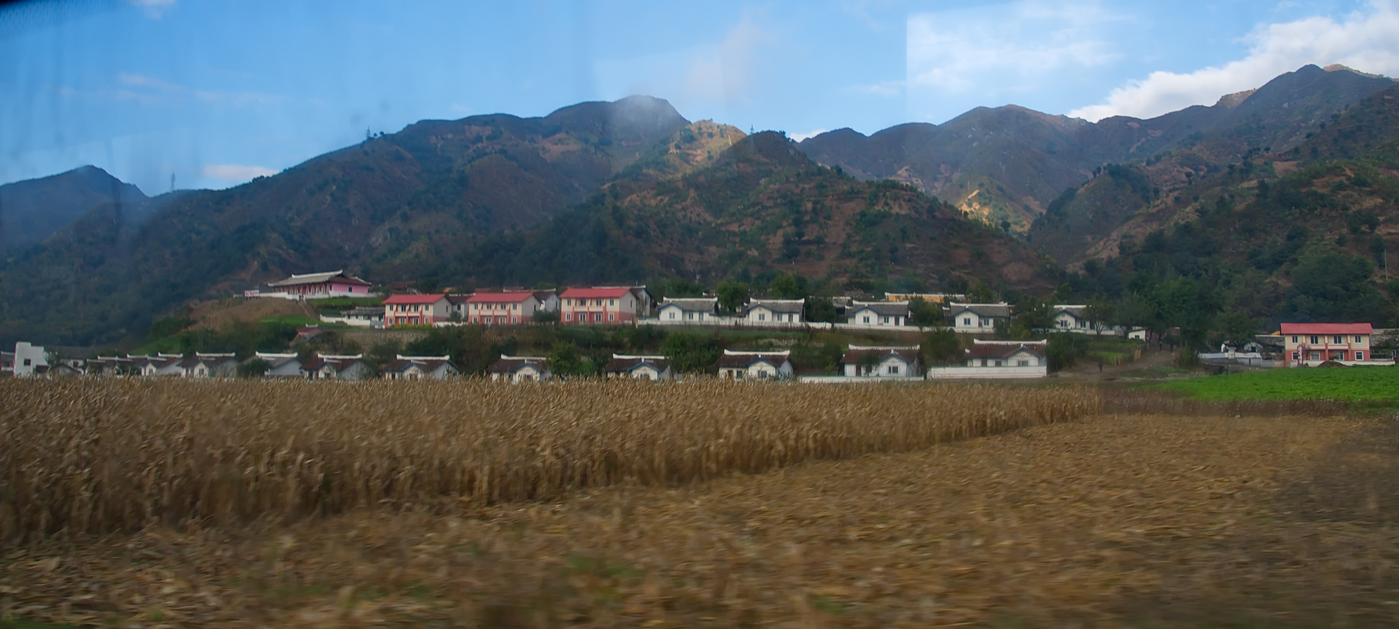 Nordkorea 2015 - Myohyang Berge